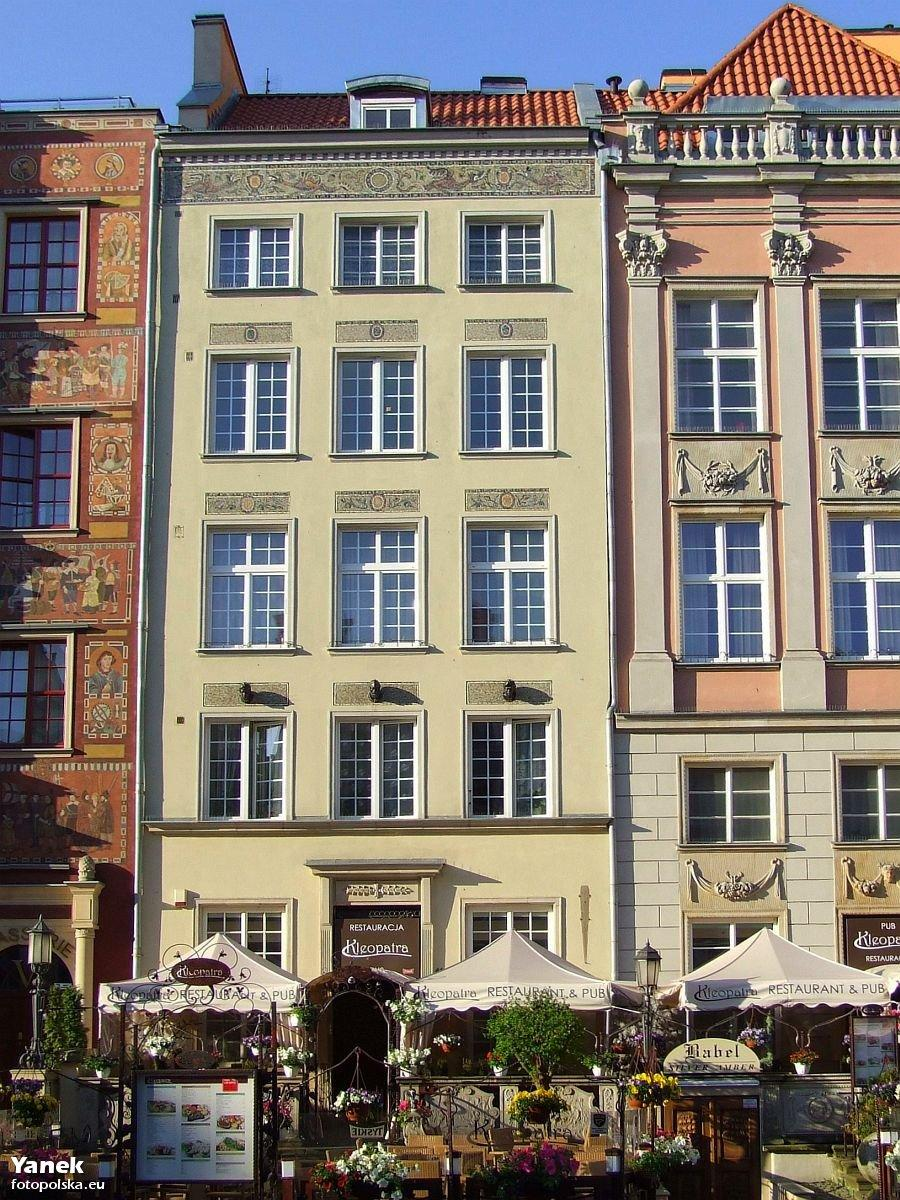 Dom nr 18 należał w XVII w. do rajcy Kerschensteina, męża słynnej w owym czasie z urody oraz wielu innych talentów Konstancji, z domu Zierenberg. Po odbudowie z lat 40-tych XX w., fasada domu uznana klasycznie za ... bezstylową. Autorką dekoracji fasady (mozaiki i ceramiczne głowy) z lat 1952-1953 jest Hanna Główczewska.